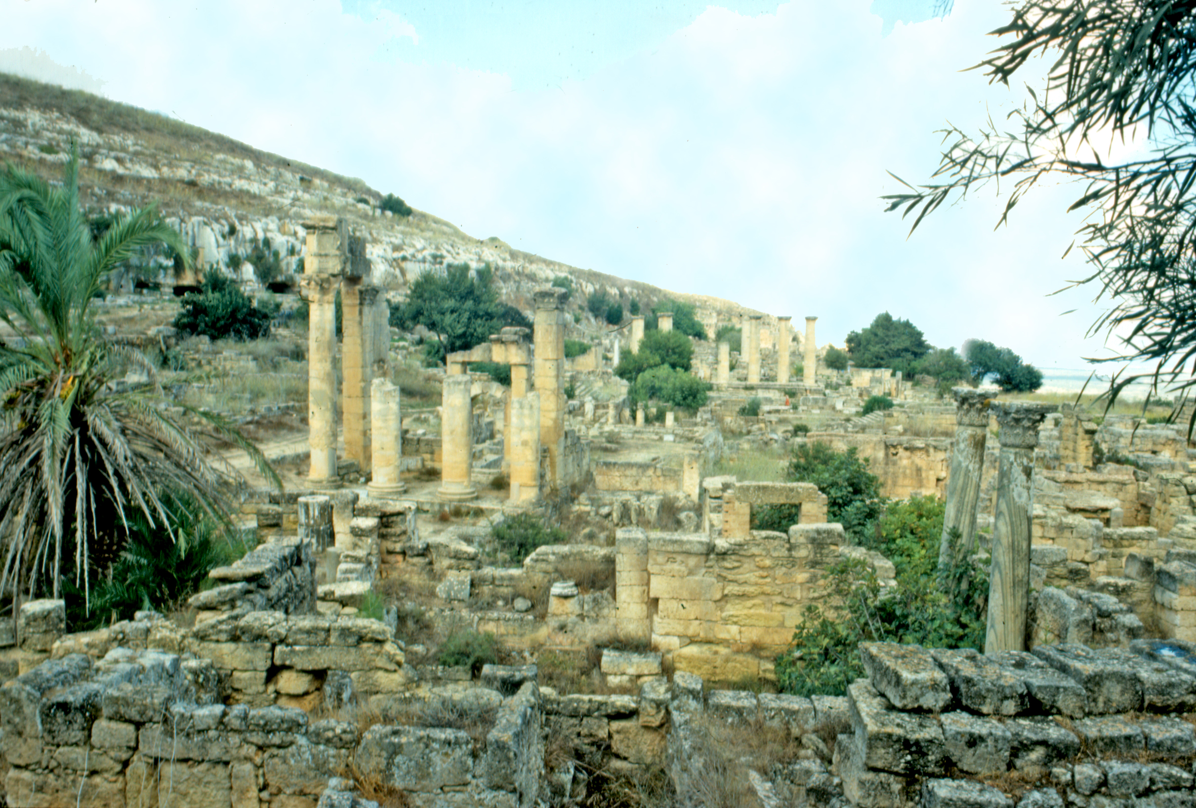 Libia, Cirene (sito archeologico), santuario di Apollo